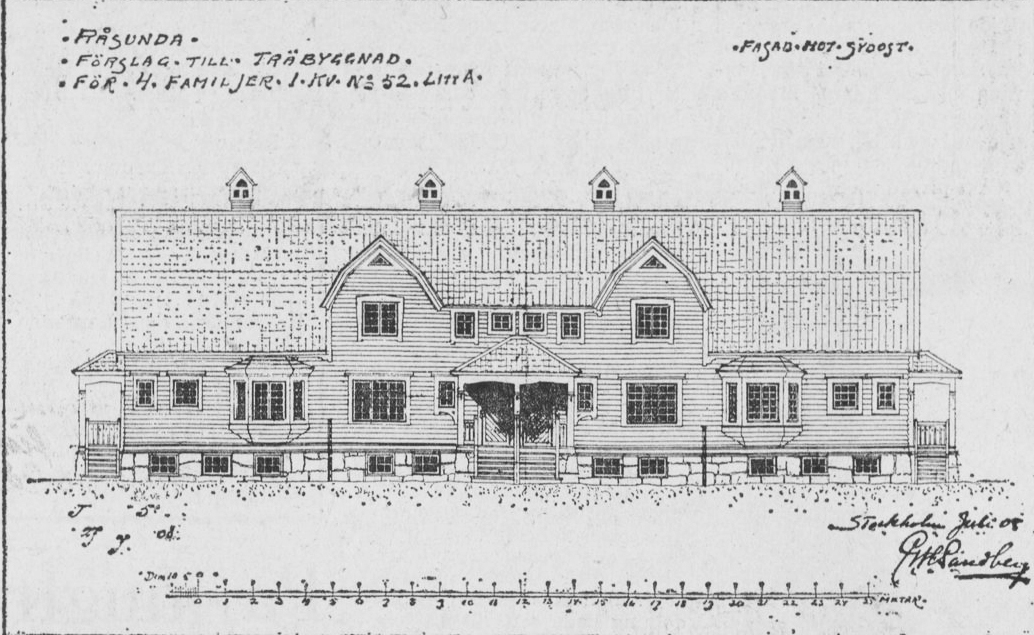 Kvarteret Fyrväpplingen, ritningar signerade Gustaf Hugo Sandberg